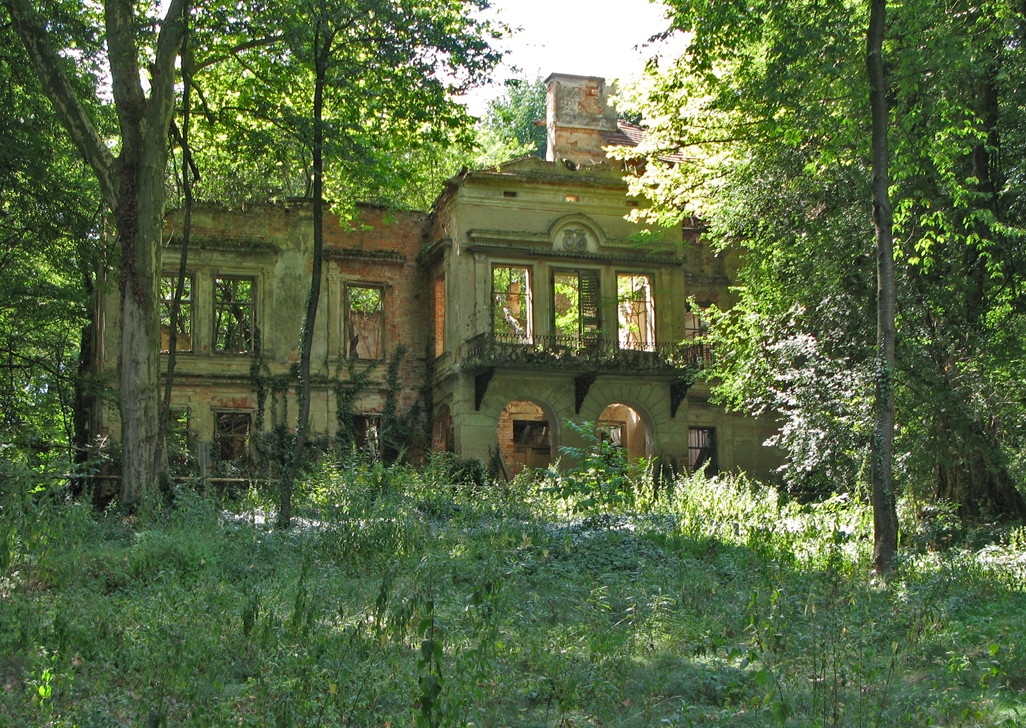 Schlossruine Matzenau Prekmurje Slowenien